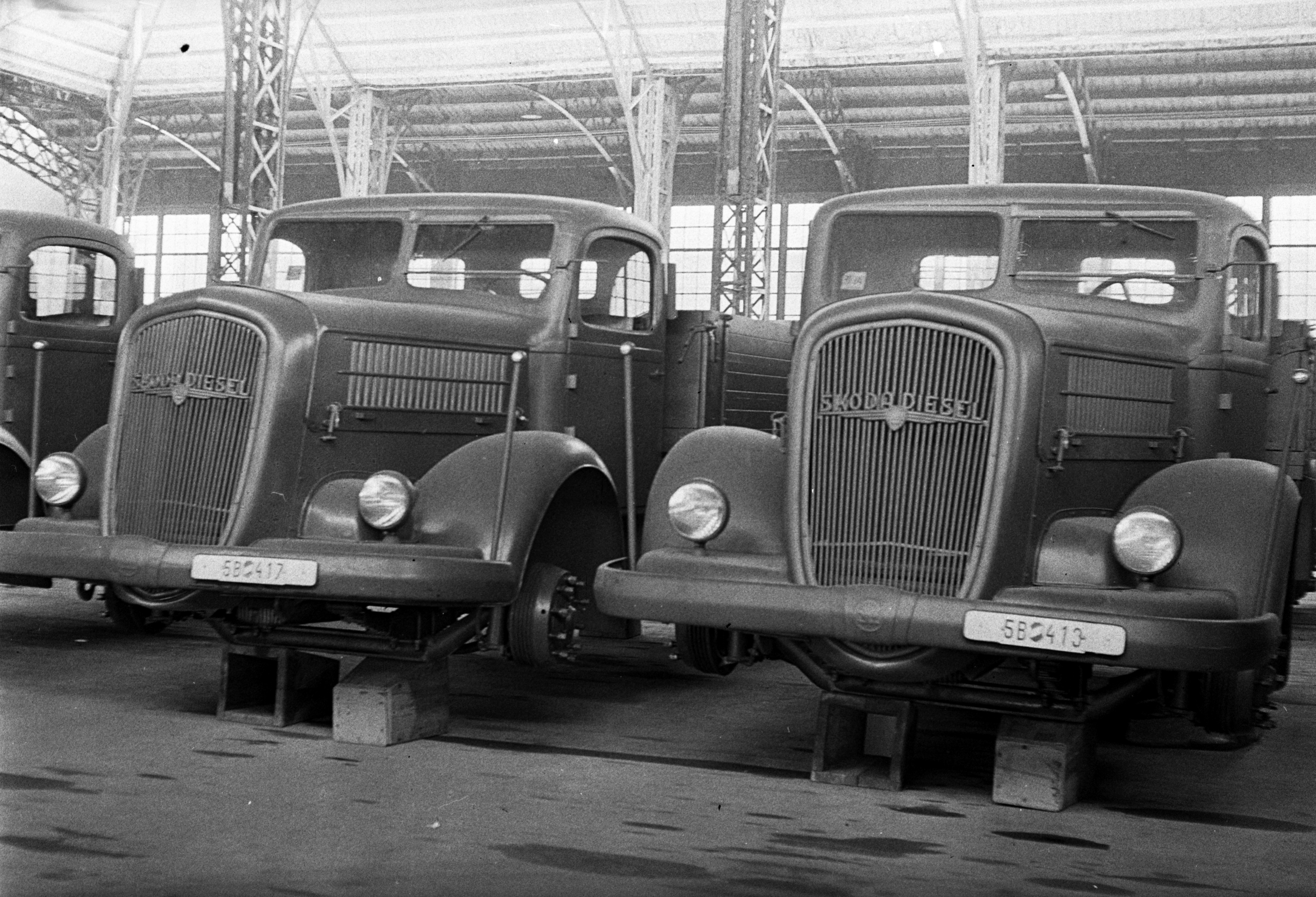 a hadianyagraktárnak használt Iparcsarnok. Location: Hungary, Budapest XIV. Tags: commercial vehicle, Czech brand, Skoda-brand, number plate, military, military number plate, Budapest Title: a hadianyagraktárnak használt Iparcsarnok.